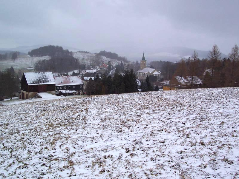 Crostau, Germany